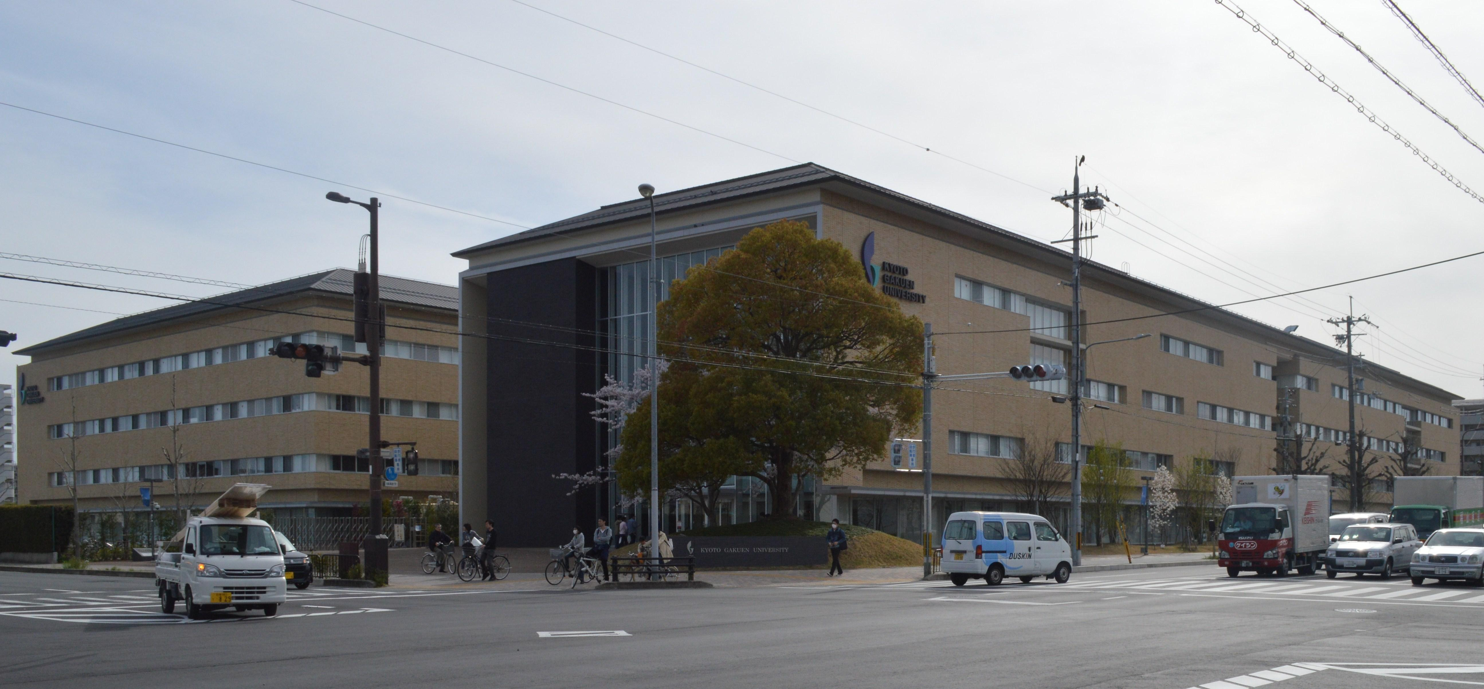 京都学園大学 京都太秦キャンパス 北東・ローソンのある交差点から